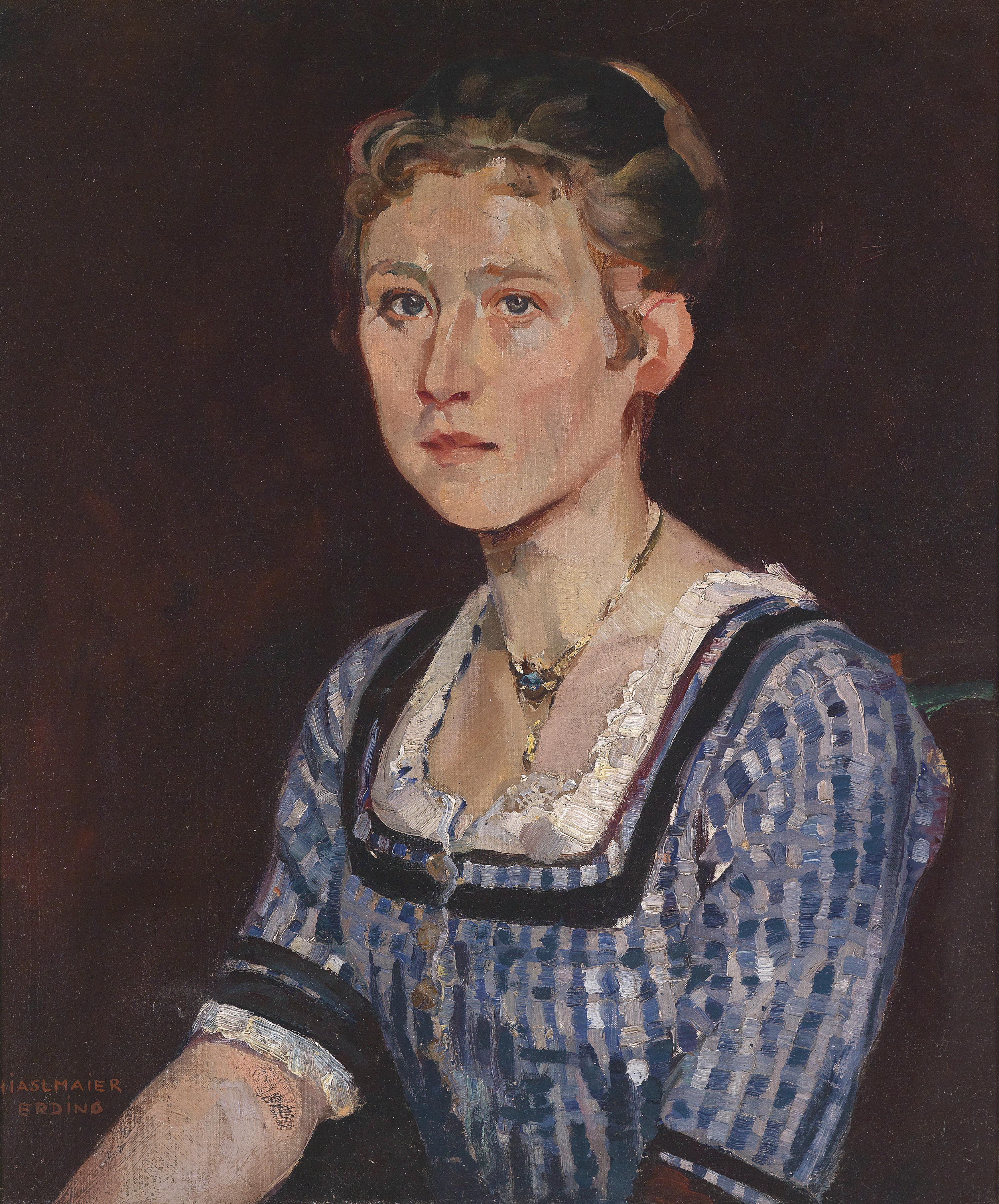 Mädl in blauer Tracht, signiert Hiasl Maier Erding, Öl auf Leinwand, 60 x 50,5 cm